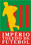 escudo